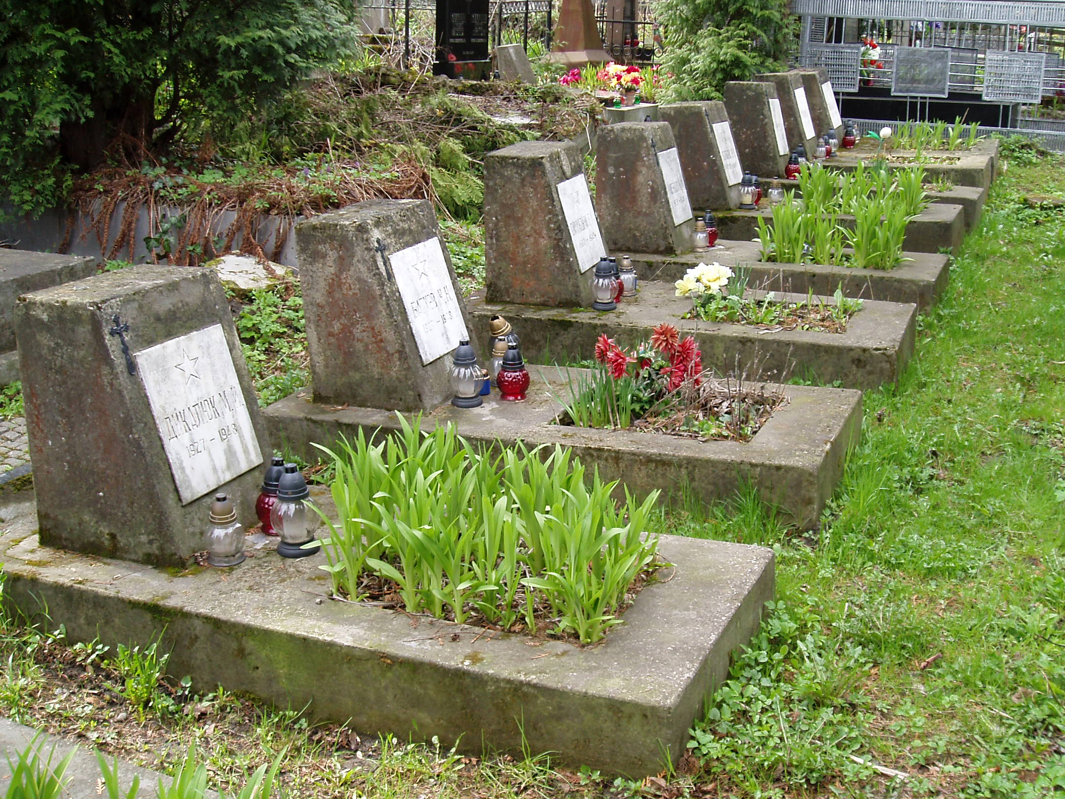 Типові могили, з яких раніше складалось Марсове поле у Львові.